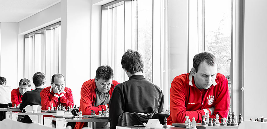 Die Spieler des FC Bayern München an den ersten vier Brettern beim Schachbundesliga-Wettkampf gegen den Hamburger SK in Hamburg